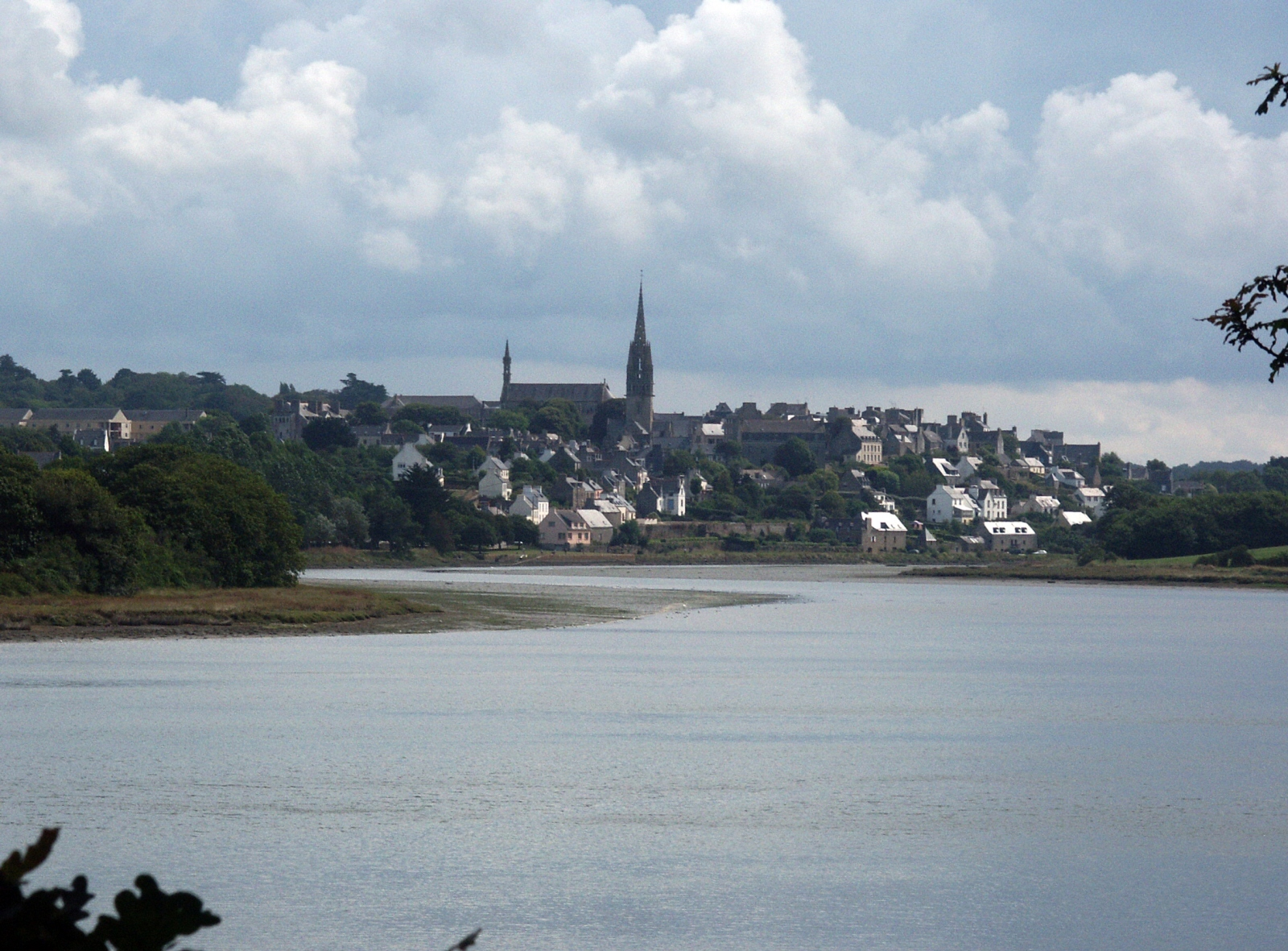 vu de Pont-Croix et Goyen